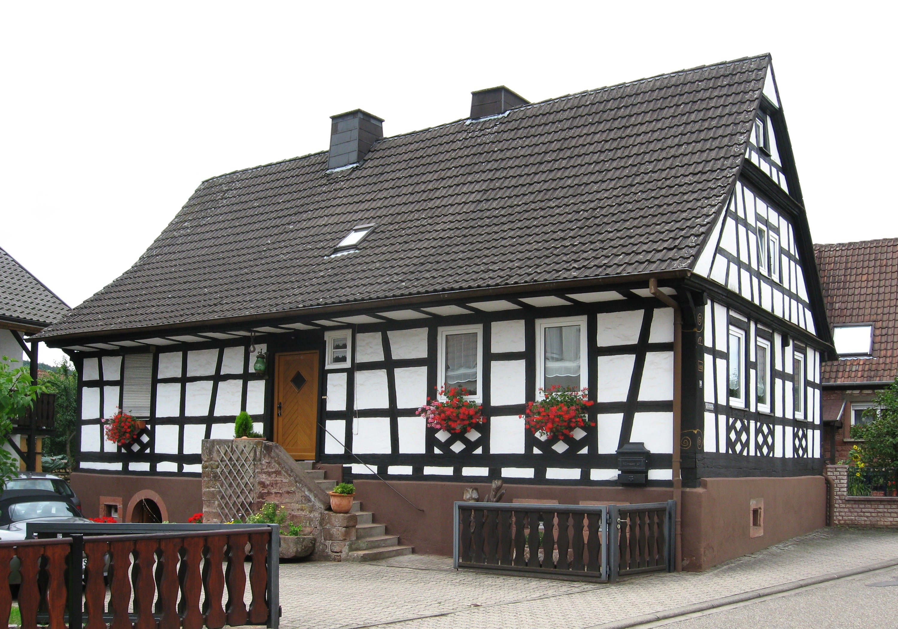 Marienstraße 19 in Fischbach bei Dahn aus dem 13. / Anfang 14. Jahrhundert.